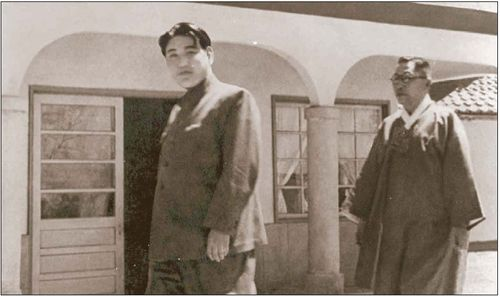 Kim Gu and Kim Il-sung in 1948.04